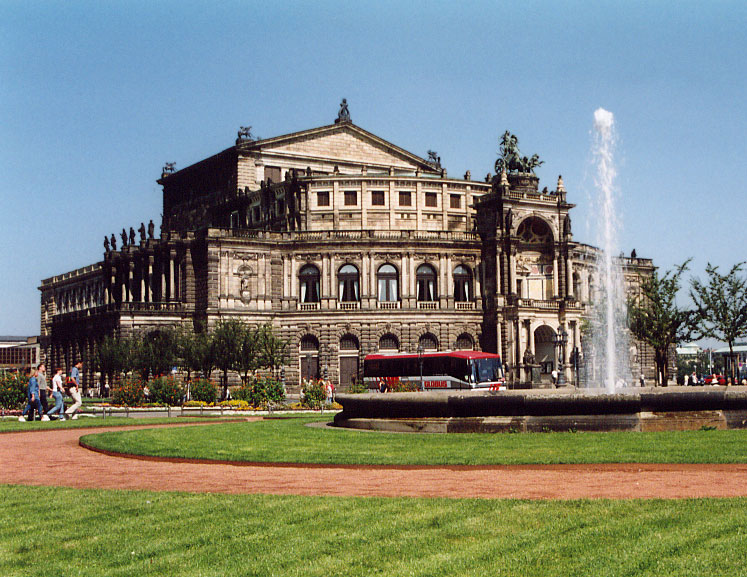 Semperoper, Dresden.